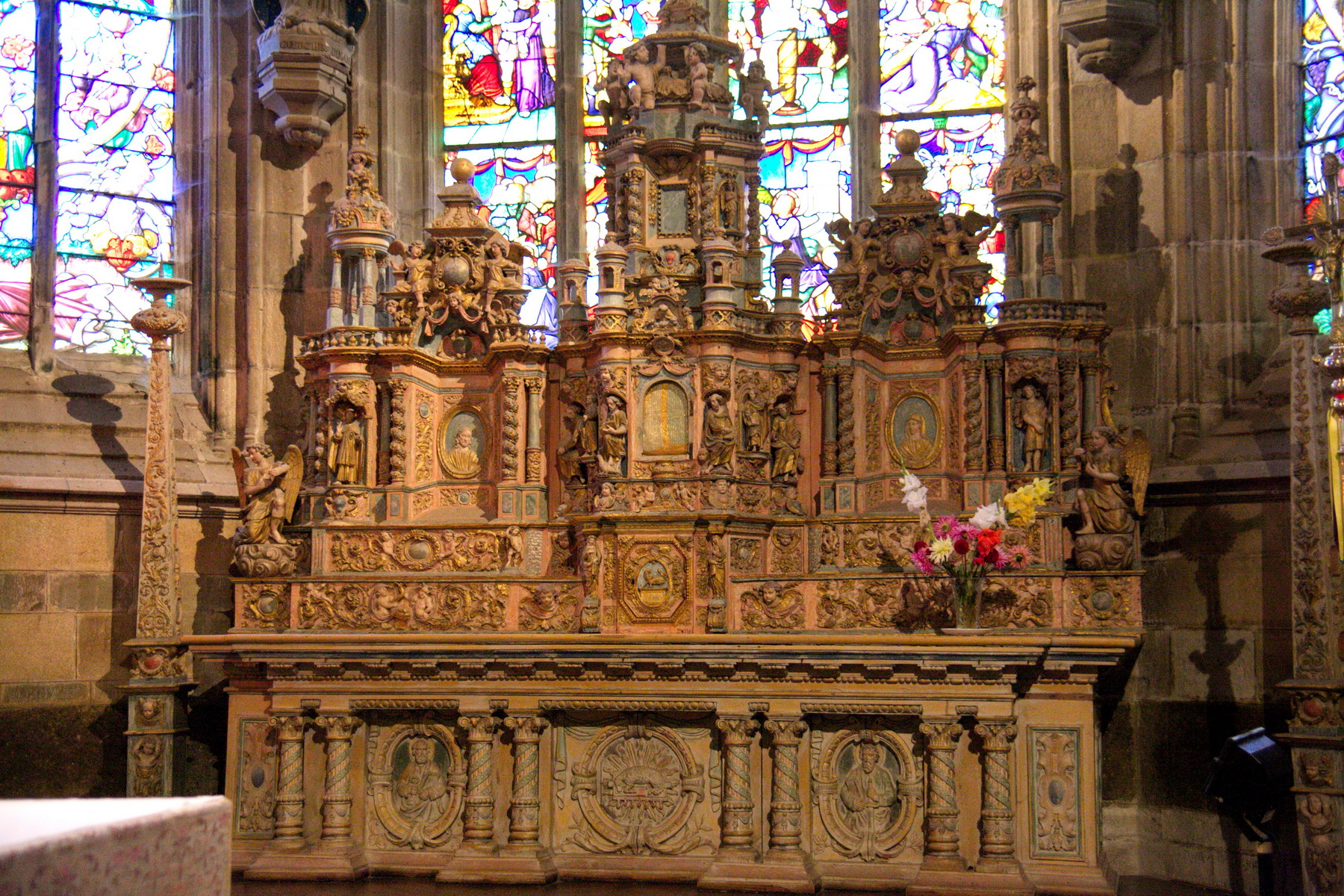 Enclos paroissial de Pleyben (Classé), maître-autel et son retable.